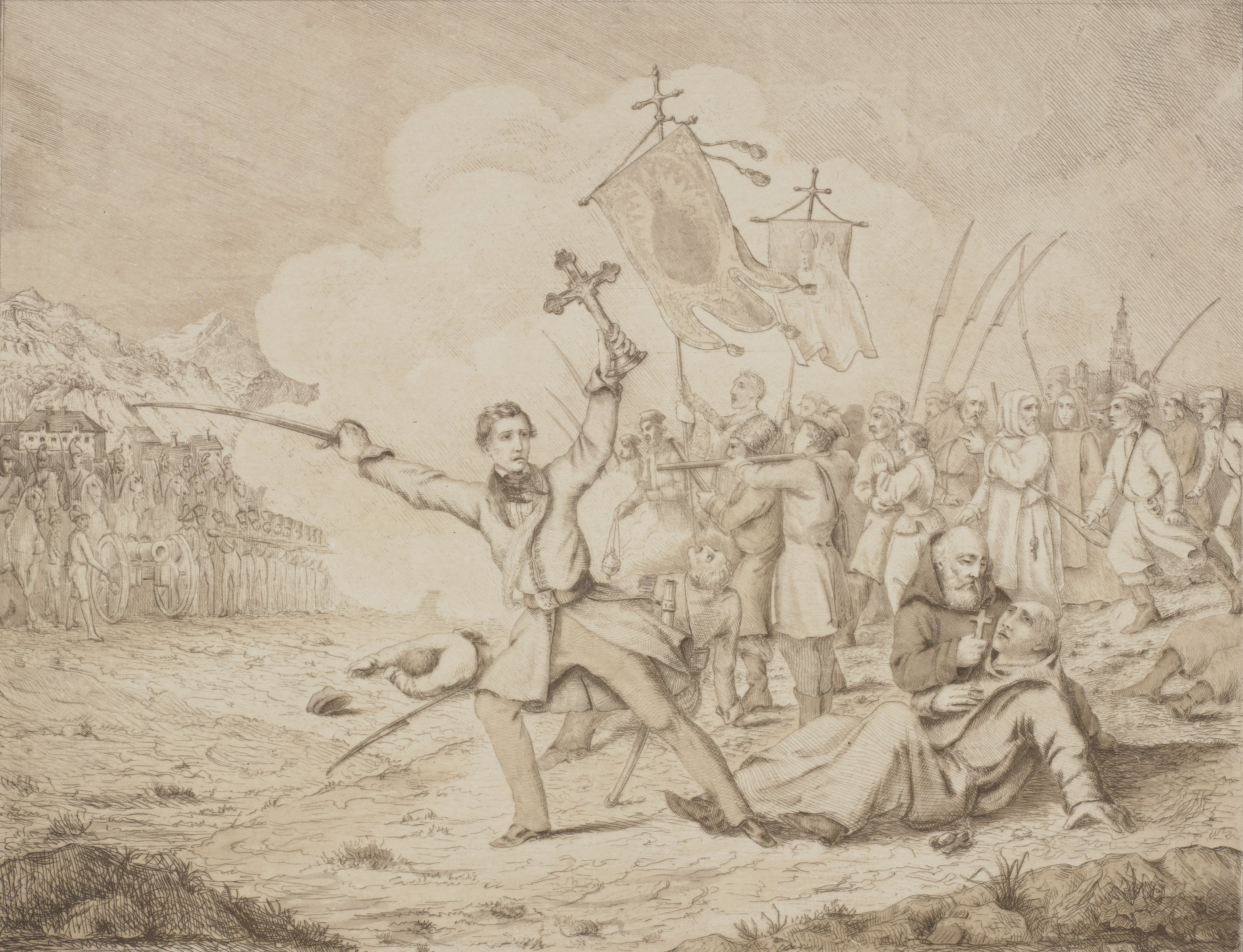 Akwaforta sprzed 1855 roku. Biblioteka Narodowa, sygnatura G.28925/II.